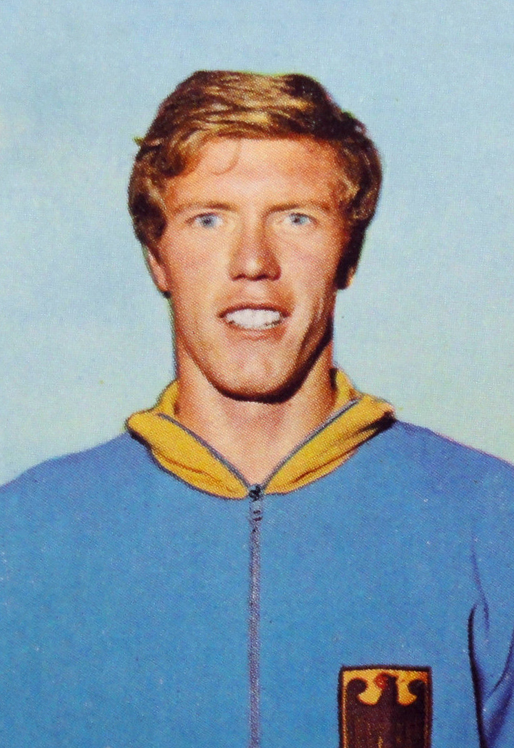 CAMPIONI DELLO SPORT 1969/70-n.26-KEMPER (GER)-ATLETICA LEGG.